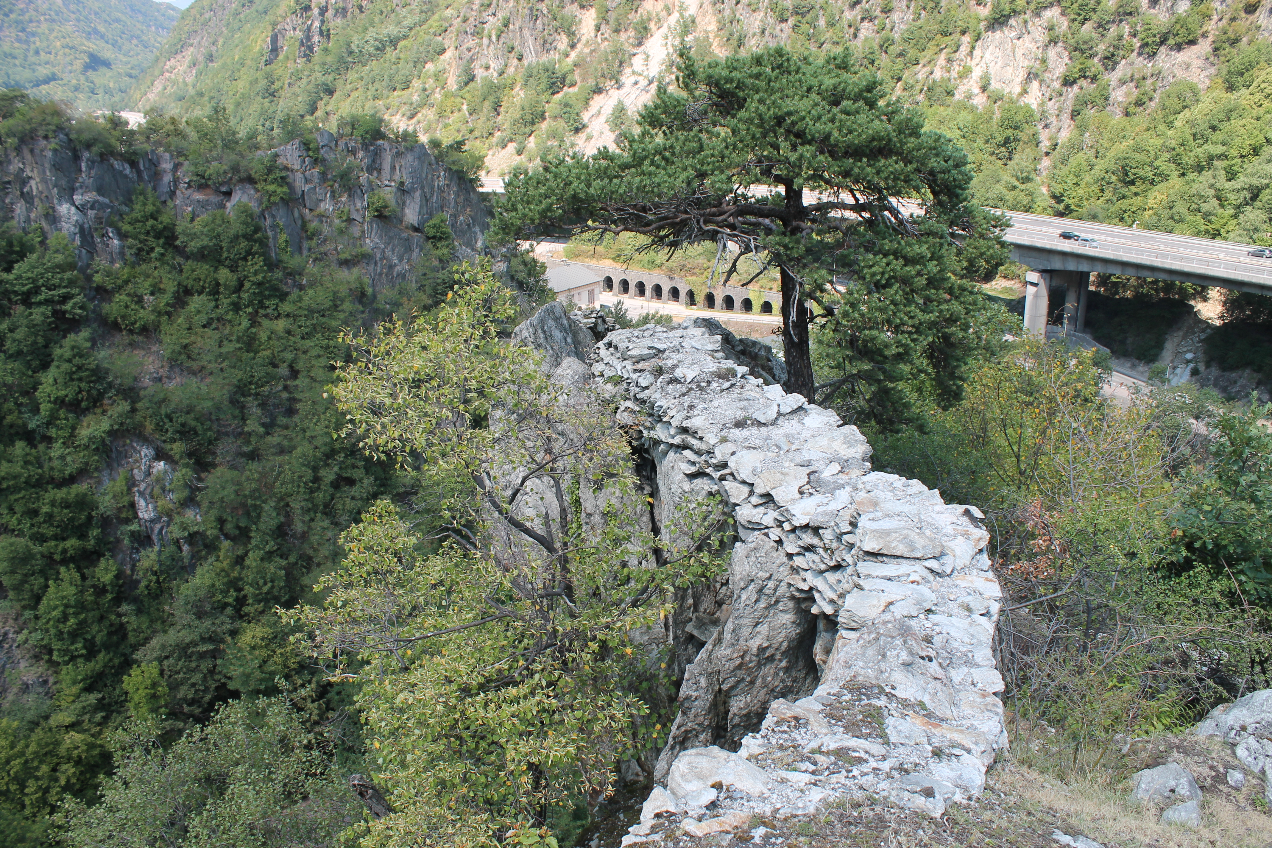 Vestiges de l'enceinte du château de Briançon. En arrière-plan, le viaduc du Champ-du-Comte (La Léchère, 1989).